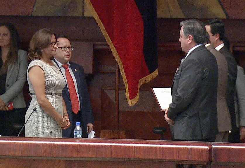 Sesión No. 505 del Pleno de la Asamblea Nacional TEMA: 1. Himno Nacional de la República del Ecuador; y, 2. Elección de Presidenta o Presidente de la Asamblea Nacional. Presidenta de la Asamblea Nacional Elizabeth Cabezas Sesión No. 505 del Pleno de la Asamblea Nacional TEMA: 1. Himno Nacional de la República del Ecuador; y, 2. Elección de Presidenta o Presidente de la Asamblea Nacional.